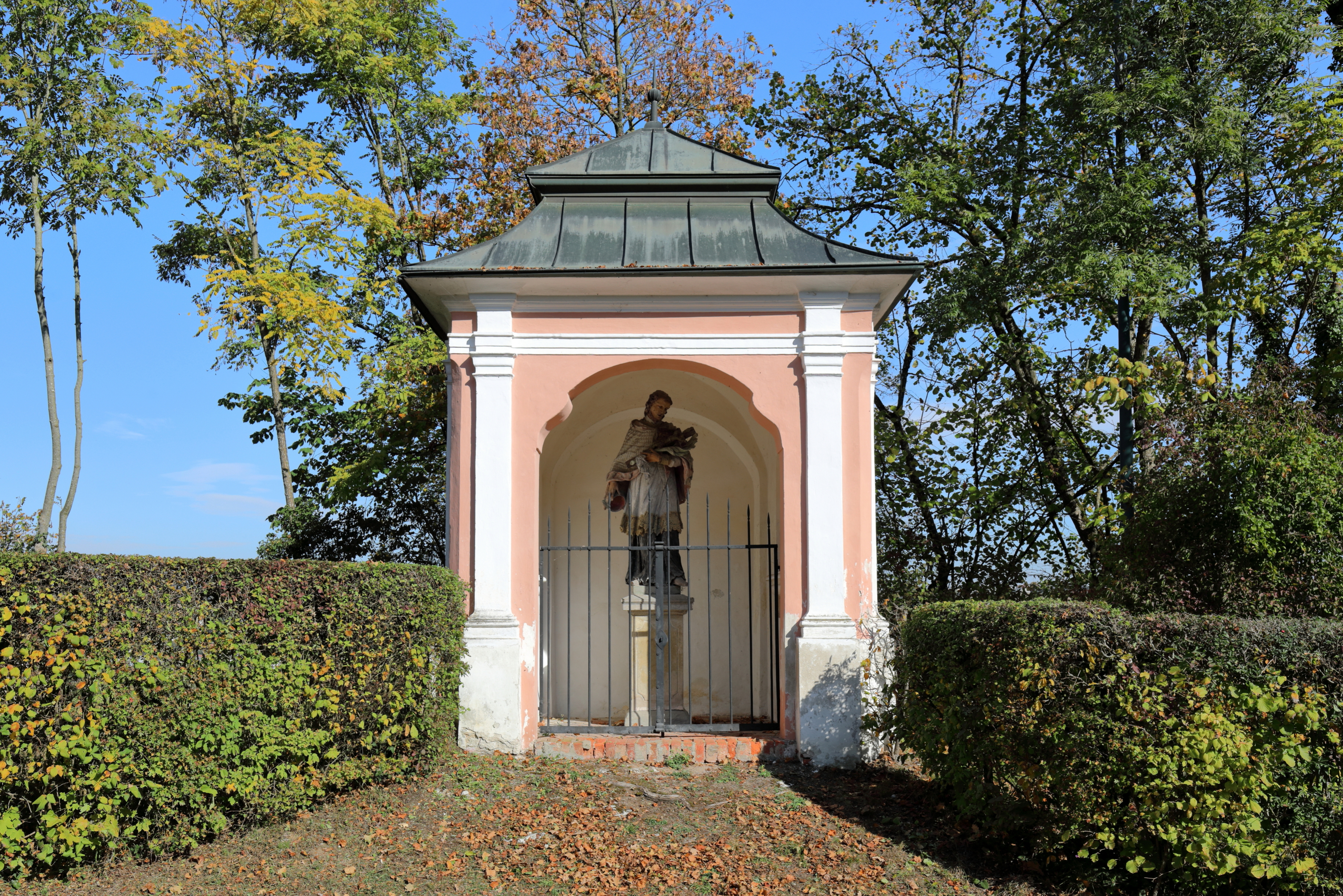 Nepomukkapelle nächst der Pfarr- und Wallfahrtskirche Zum göttlichen Christuskind in Christkindl, ein Ortsteil der oberösterreichischen Stadt Steyr.Die barocke Wegkapelle, schräg gegenüber der Loretokapelle, wurde um 1740 errichtet. Im Inneren eine Steinfigur des heiligen Johannes Nepomuk, ebenfalls aus der Zeit um 1740.